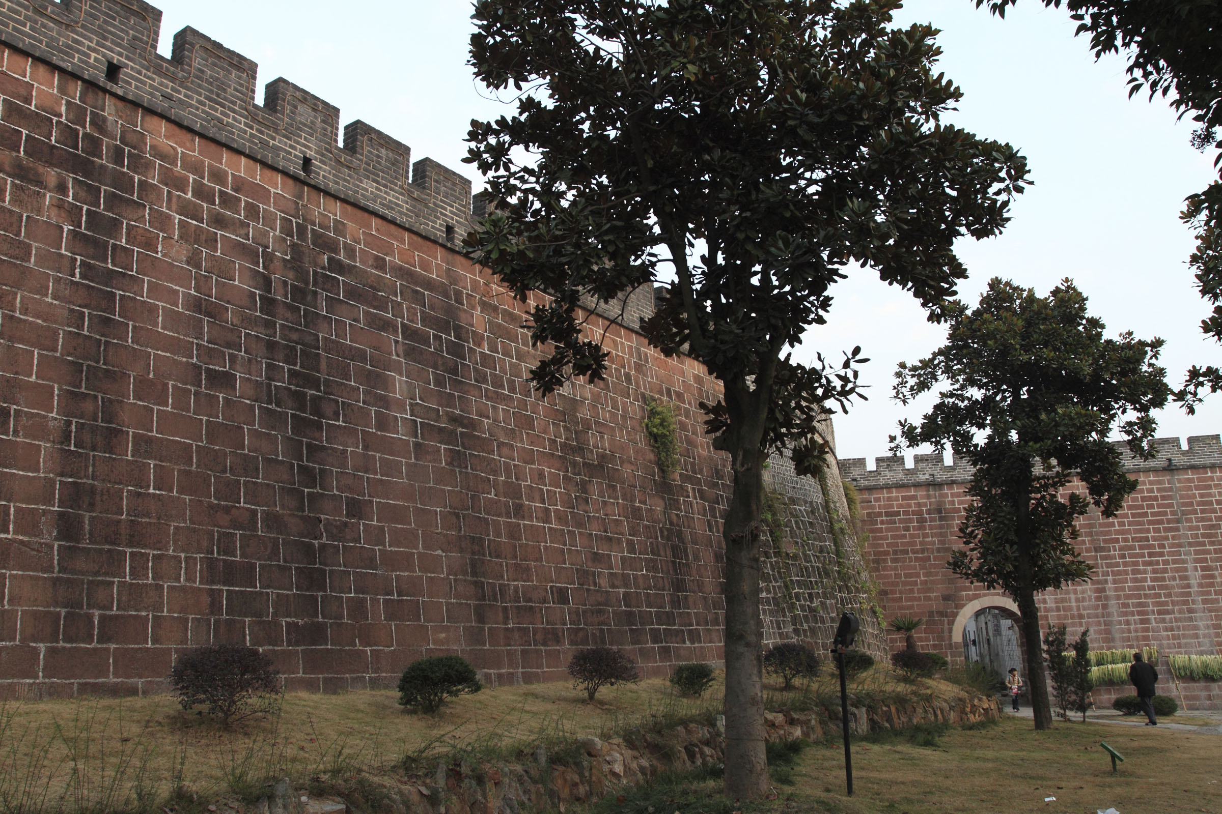 安徽省歙县城墙小西门。